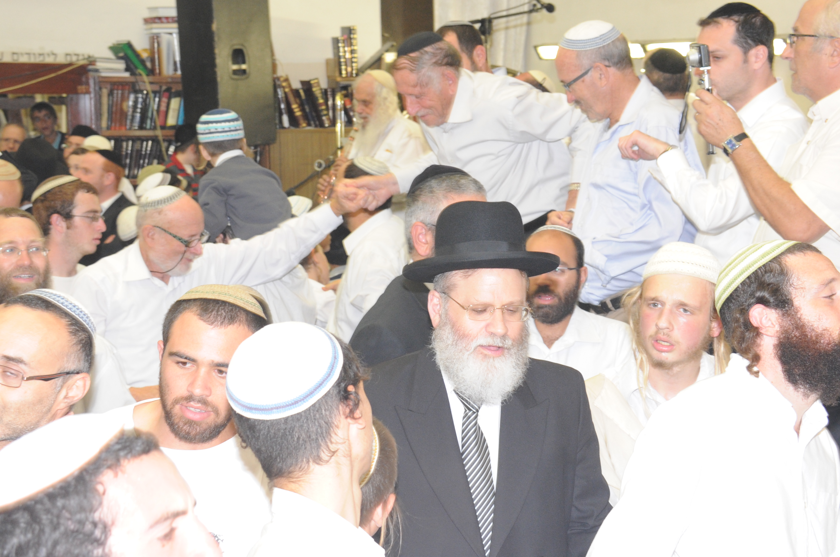 הרב אהרון דרשביץ בשמחת בית השואבה בישיבת מרכז הרב